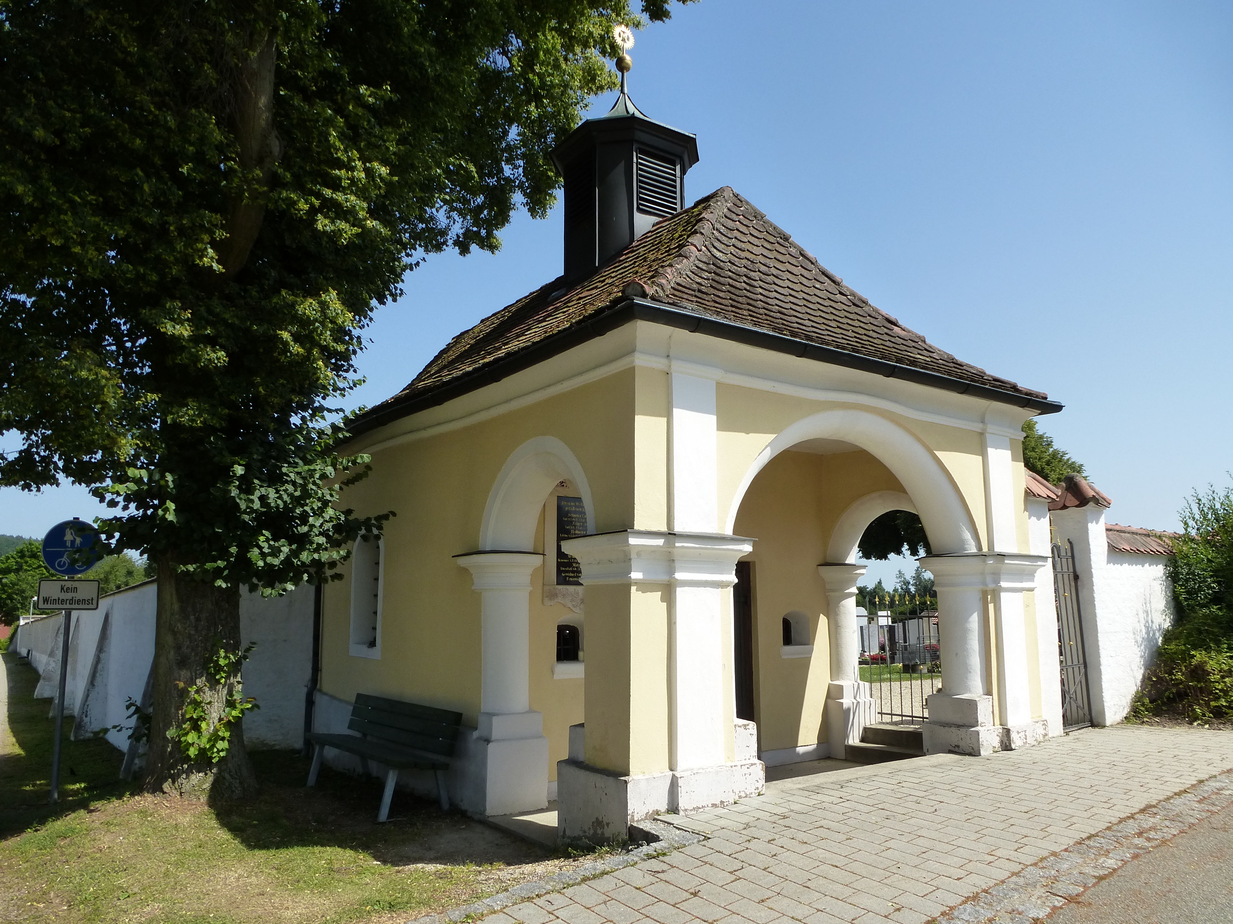 Sog. Hohenrainkapelle, Wörth a.d.Donau